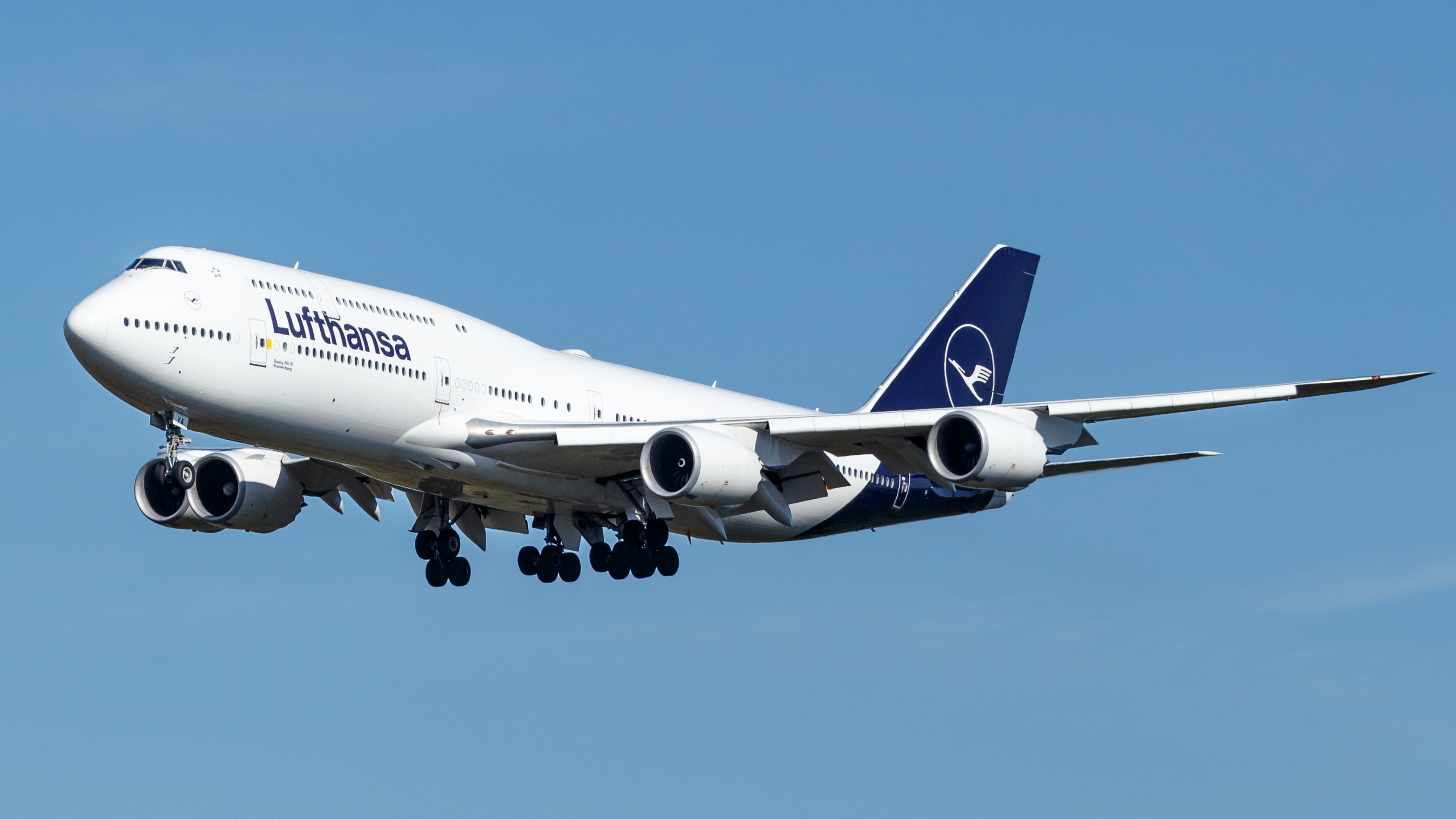 D-ABYA Lufthansa B748 Brandenburg.jpg